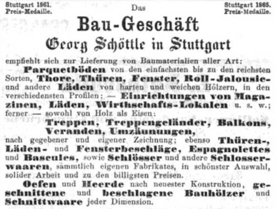 Anzeige des Bau-Geschäfts Georg Schöttle Stuttgart, 1868.